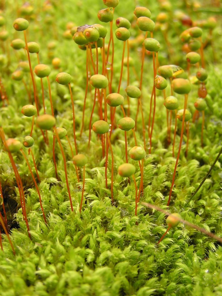 Philonotis calcarea am Formarinsee bei Lech in Vorarlberg (Österreich)